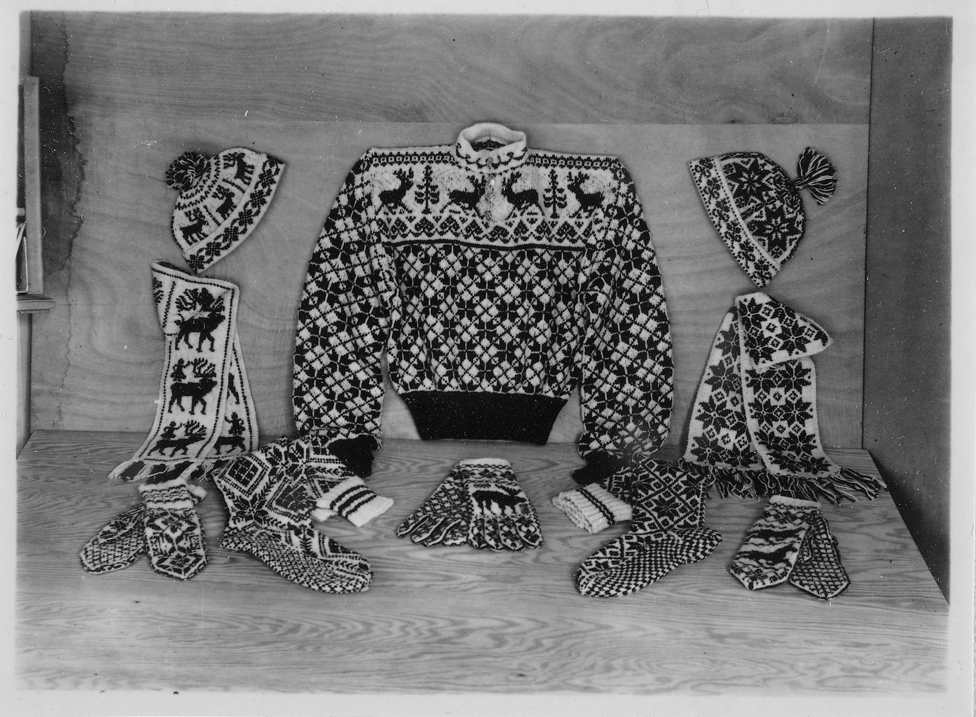 Bildet er hentet fra Arkivverket. Utstilling med eksempler på selbuvarer. Strikkende votter, vanter, luer, strømper, skjerf og en genser er utstilt. Arkivinstitusjon : Riksarkivet Arkivnavn : Landbruksdepartementet, Heimeyrkekontoret Sted : NORGE, Sør-Trøndelag, Selbu, Emneord: Strikking, Strikk, Håndarbeid, Selbustrikk Avbildet